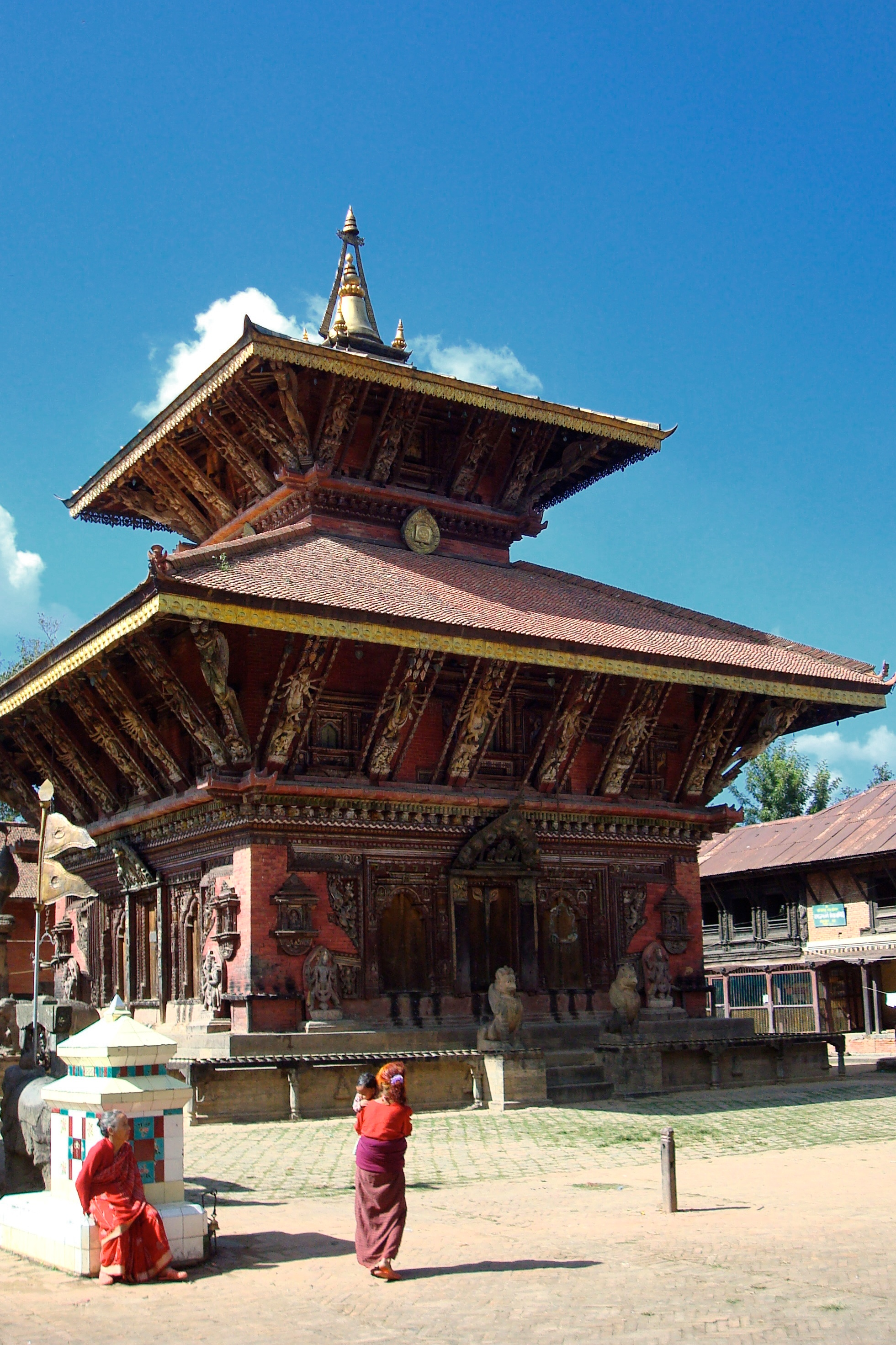 Changu Narayan